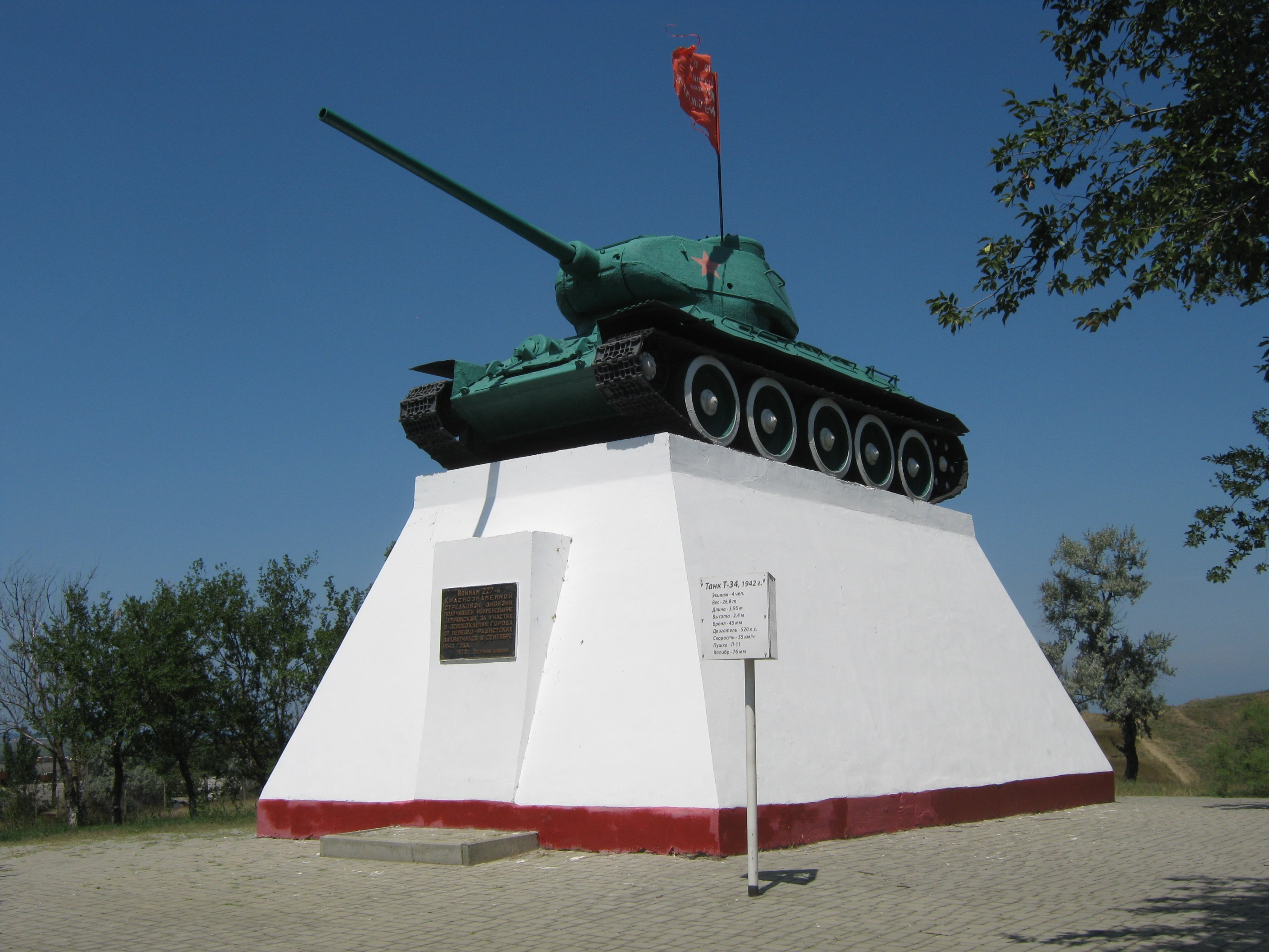 Танк Т-34, установленный в честь воинов-танкистов, принимавших участие в освобождении Темрюкского района от фашистских захватчиков: на горе Мыска, Темрюк, Темрюкский район, Краснодарский край